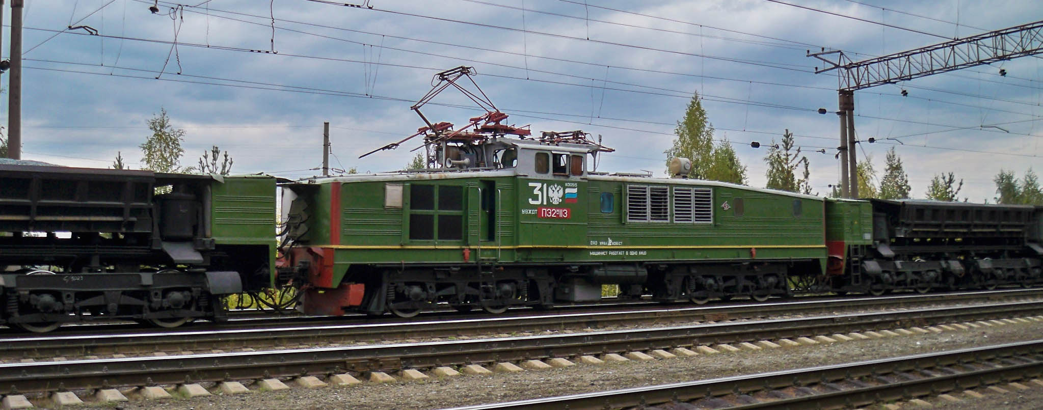 Тяговый агрегат ПЭ2М-113, станция Асбест.